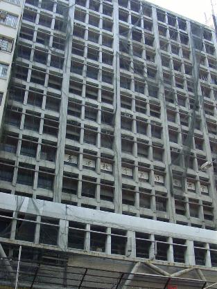 Garlay Building in HK